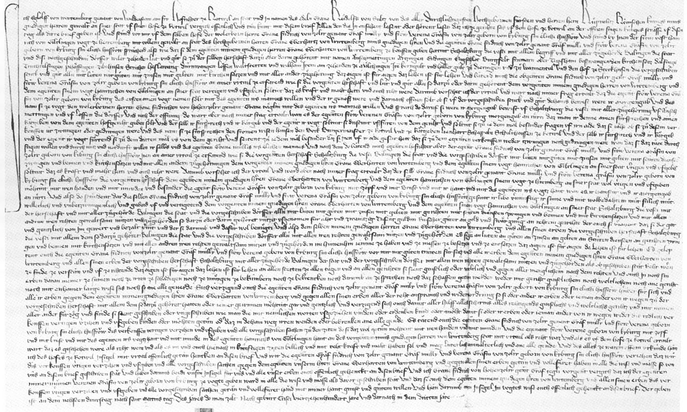 Hofrichterliche Bestätigung des Verkaufs der Herrschaft Schalksburg